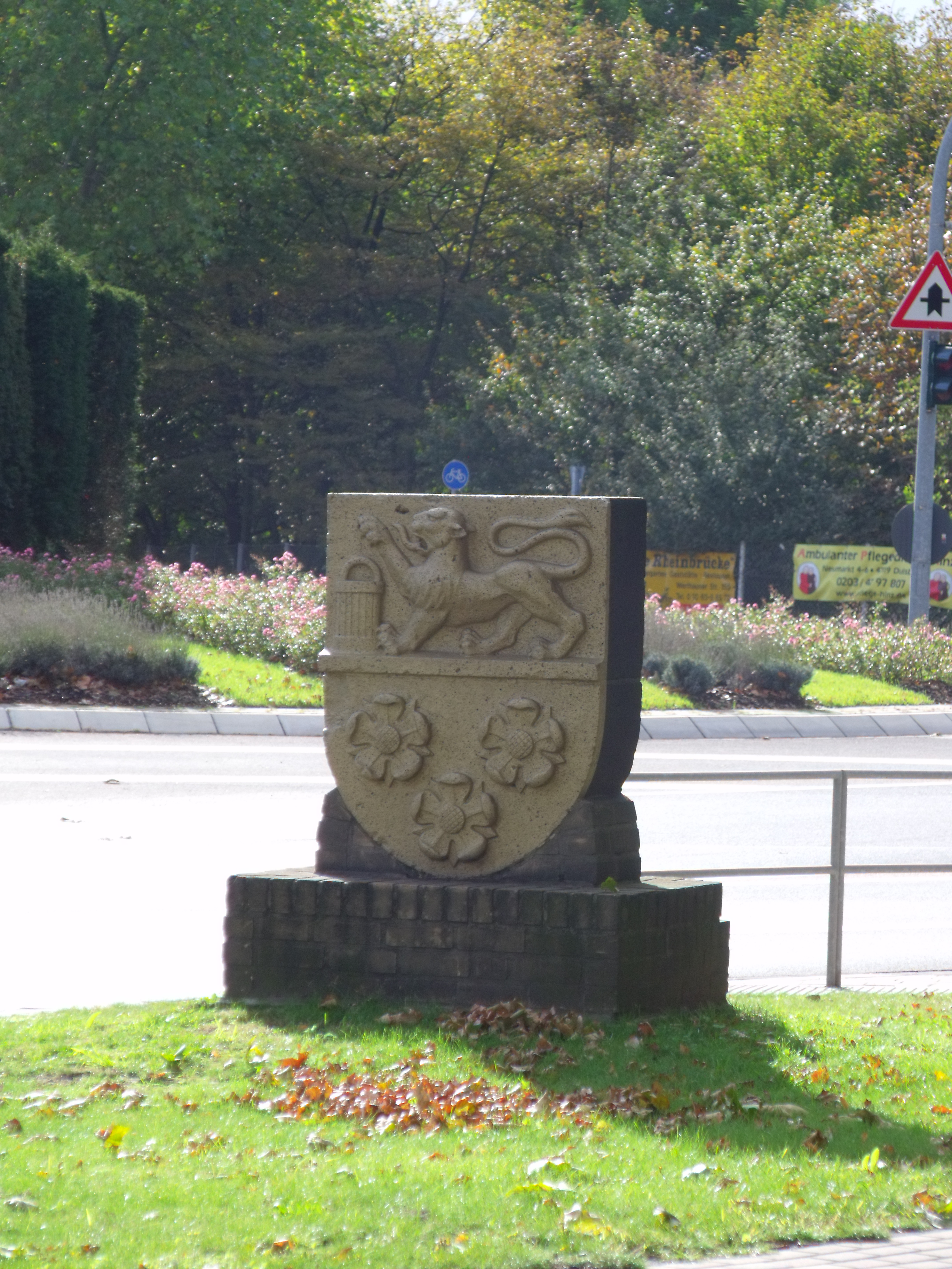 Rheinhausens Wappen aus Stein. Auf einer Verkehrsinsel am Anfang der Brücke der Solidarität. Es wurde zum Schutz vor Witterung in einer goldenen Farbe auf der Frontseite angestrichen